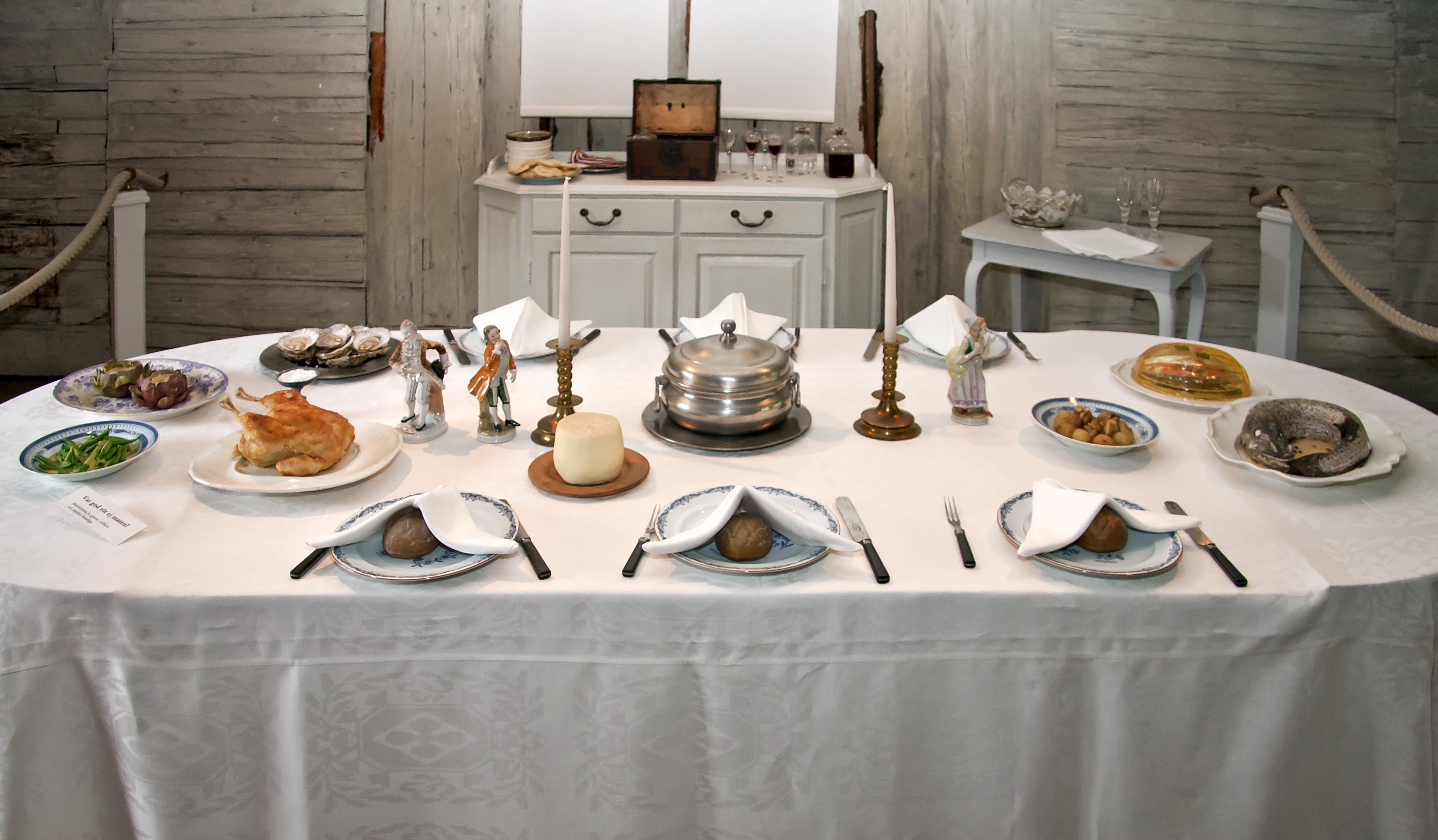 Konstgjort 1700-talsmiddagsbord utställt i Cajsa Wargs hus i Örebro. Möbler och porslin är nytillverkat i 1700-talsstil. Maten är gjord i silikon.